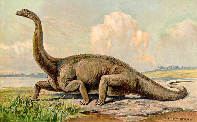 Diplodocus